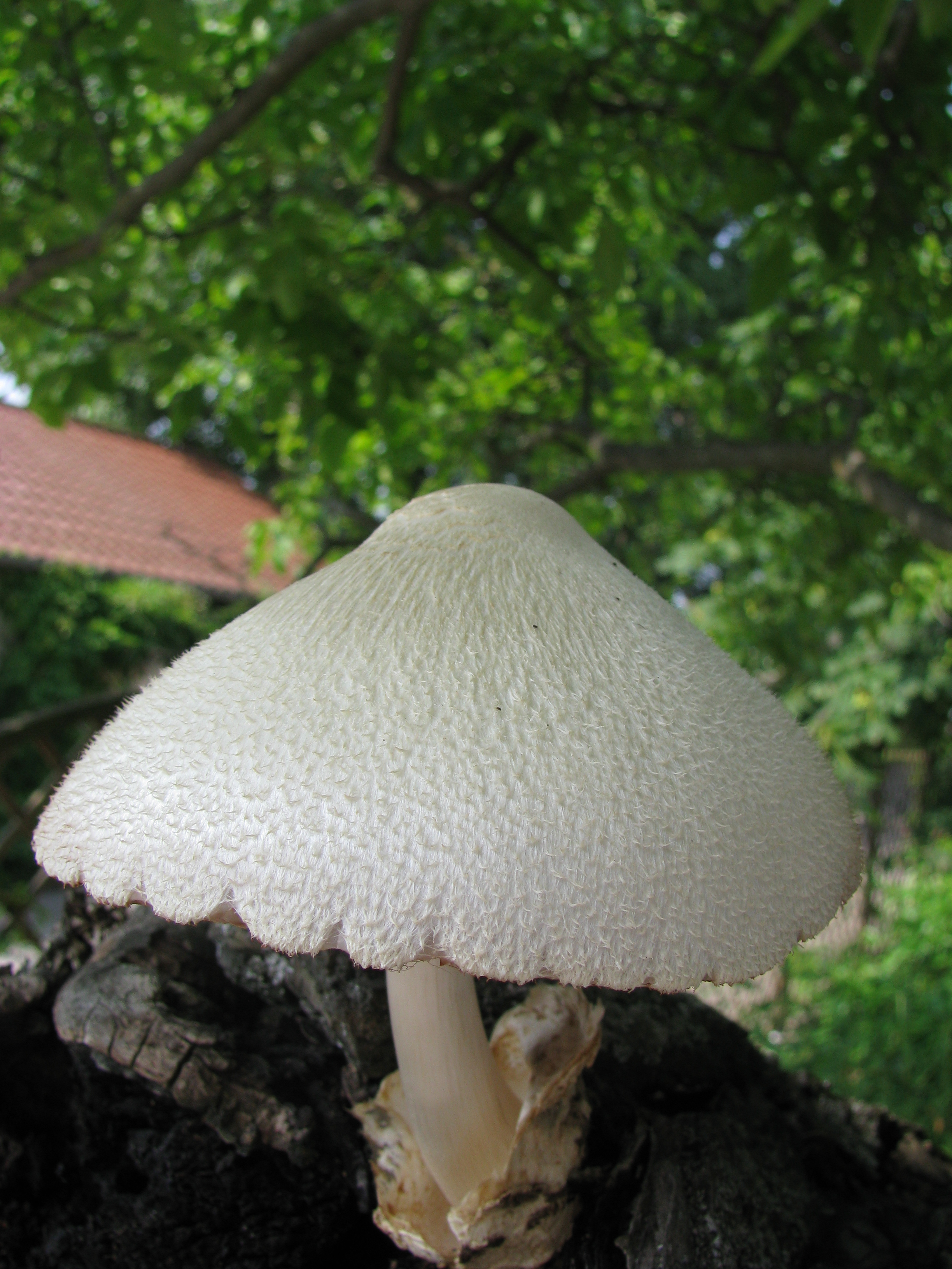 Wolliger Scheidling (Volvariella bombycina), Hutstruktur, Fundort Ingelheim, Deutschland